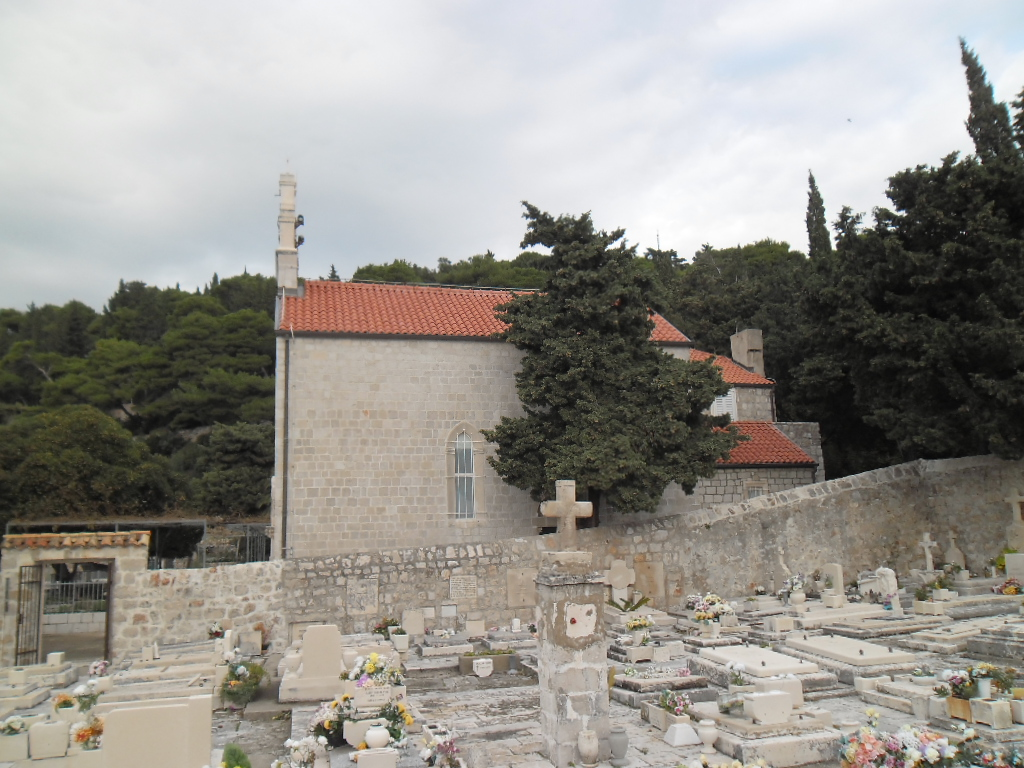 Crkva sv. Marije na Dančama s pripadajućim grobljem